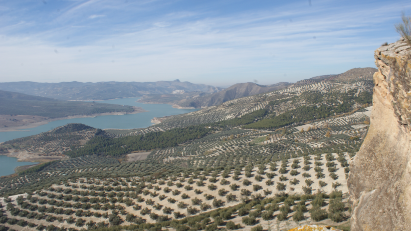 Pantano de Iznájar